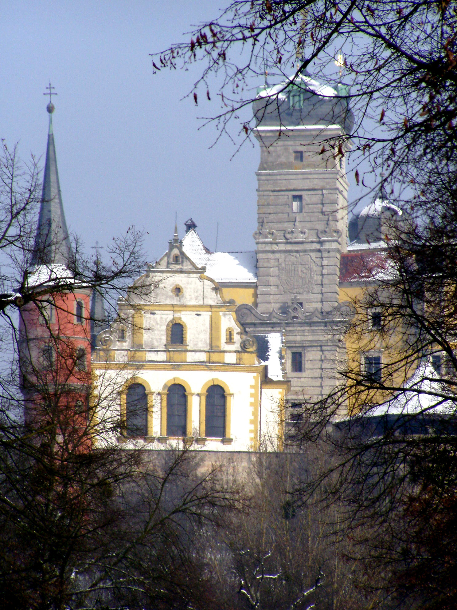 Schloss Schwarzenberg, Scheinfeld